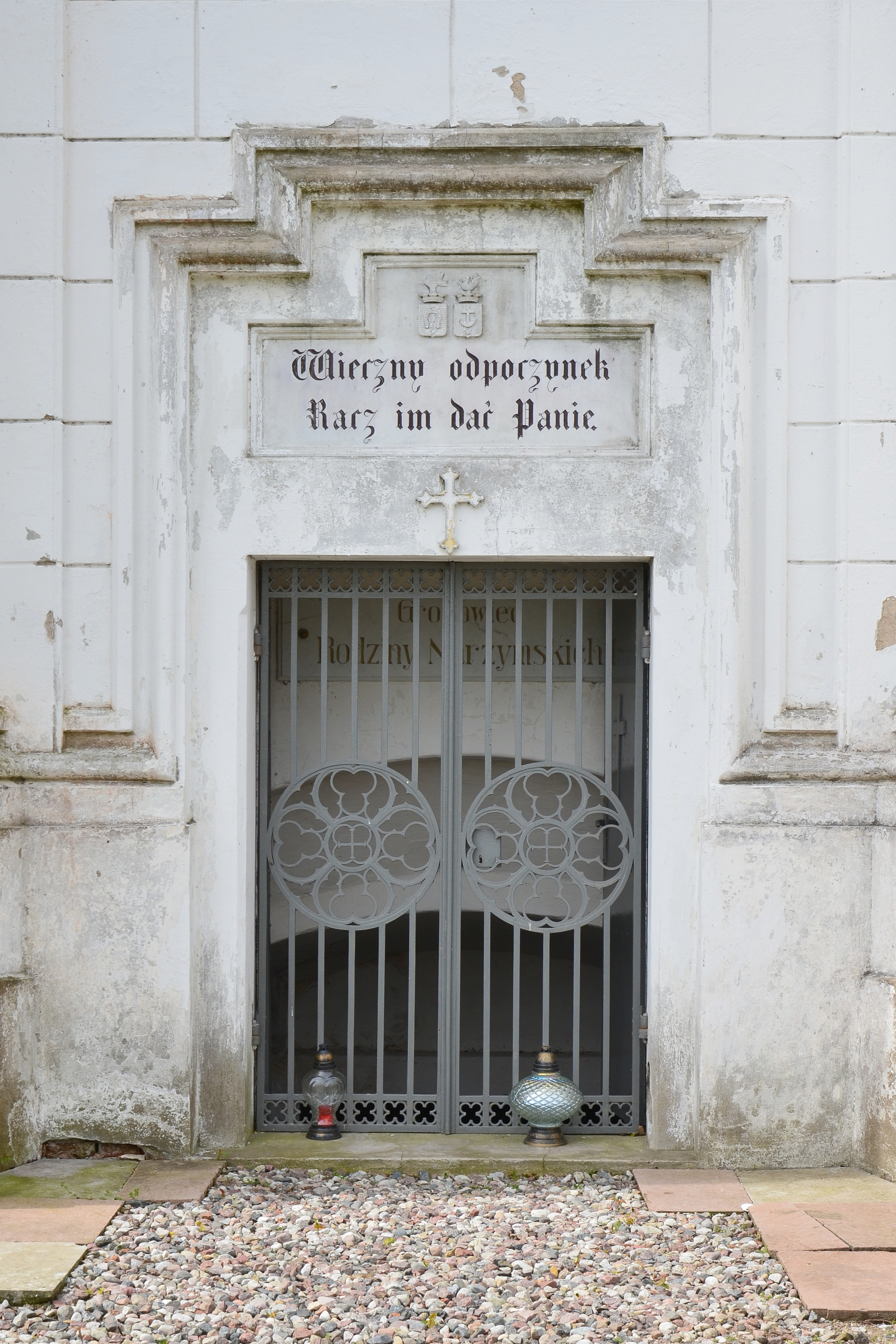 Jabłonowo-Zamek, kościół św. Wojciecha, 1860-1864